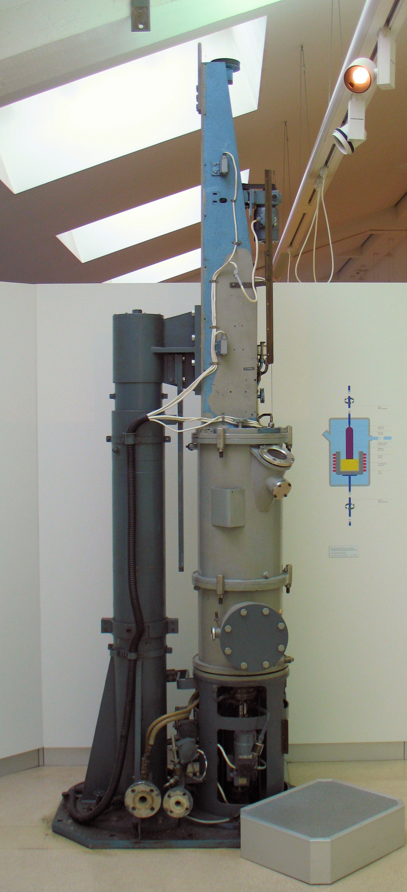 Kristallziehanlage Z141 nach Czochralski, Leybold-Hochvakuum-Anlagen GmbH, Köln; 1956. Aufgenommen im Deutschen Museum in München